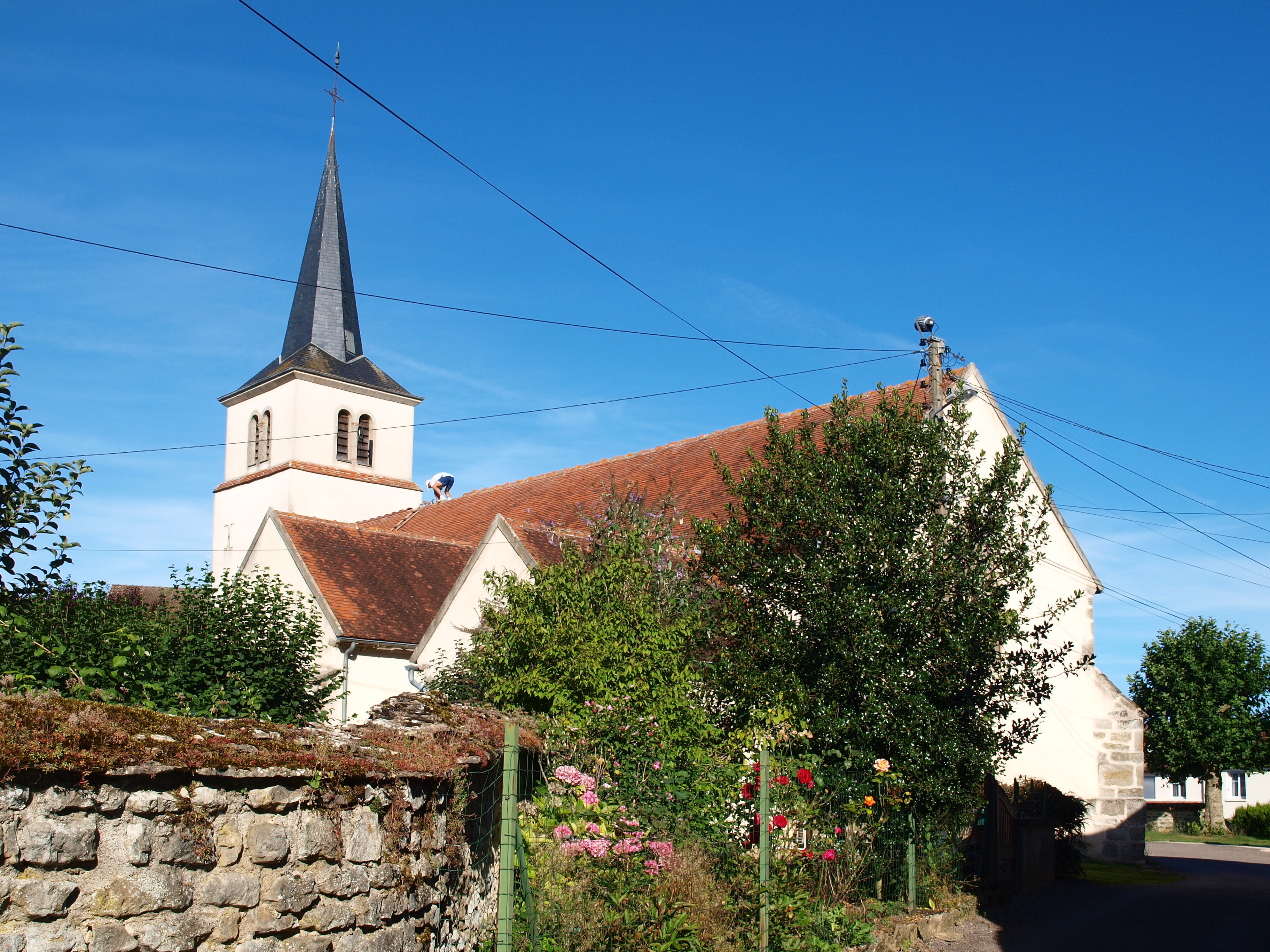 Maconge (Côte d'Or, France). L'église Sainte-Anne (un couvreur y est perché). Vue vers le nord depuis l'impasse de l'Eglise.